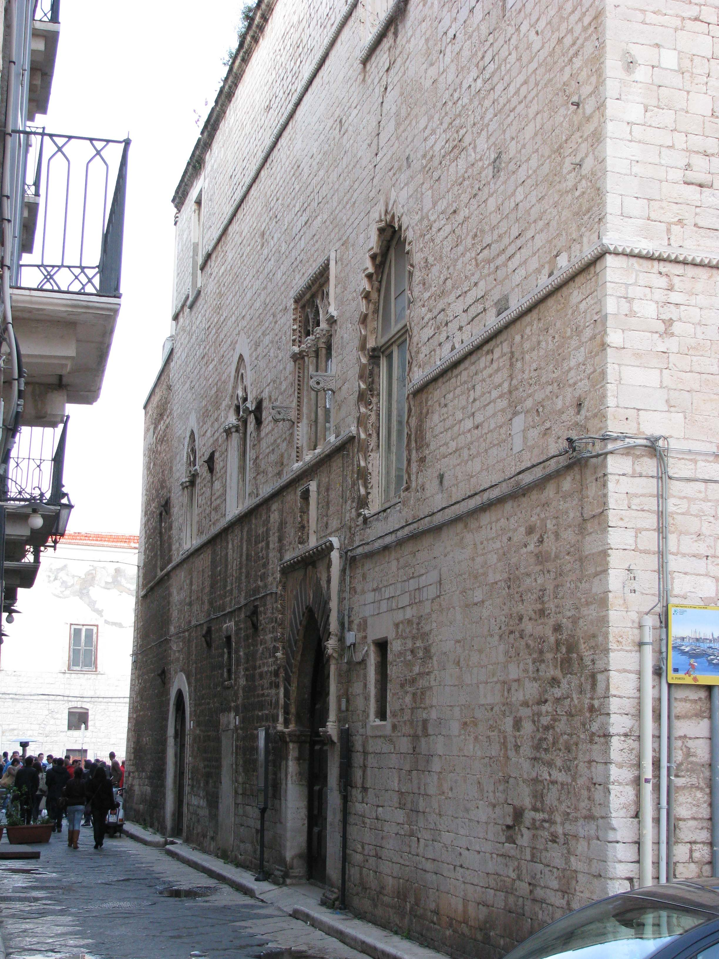 Facciata anteriore di Palazzo Caccetta